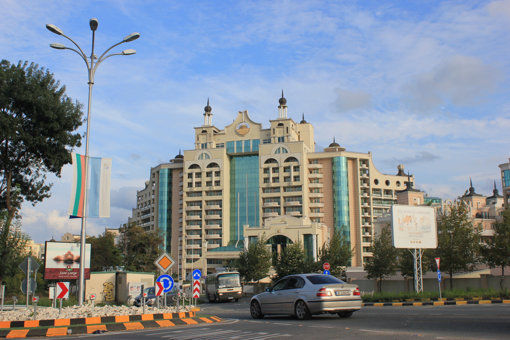 Hotel in Pomorie, Bulgarien.